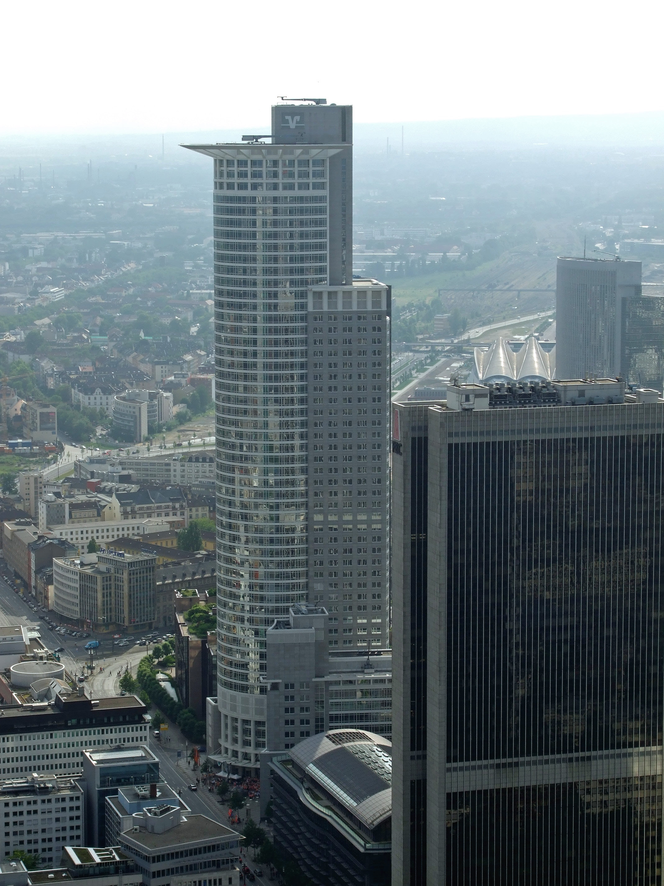 Kronenhaus der DZ-Bank